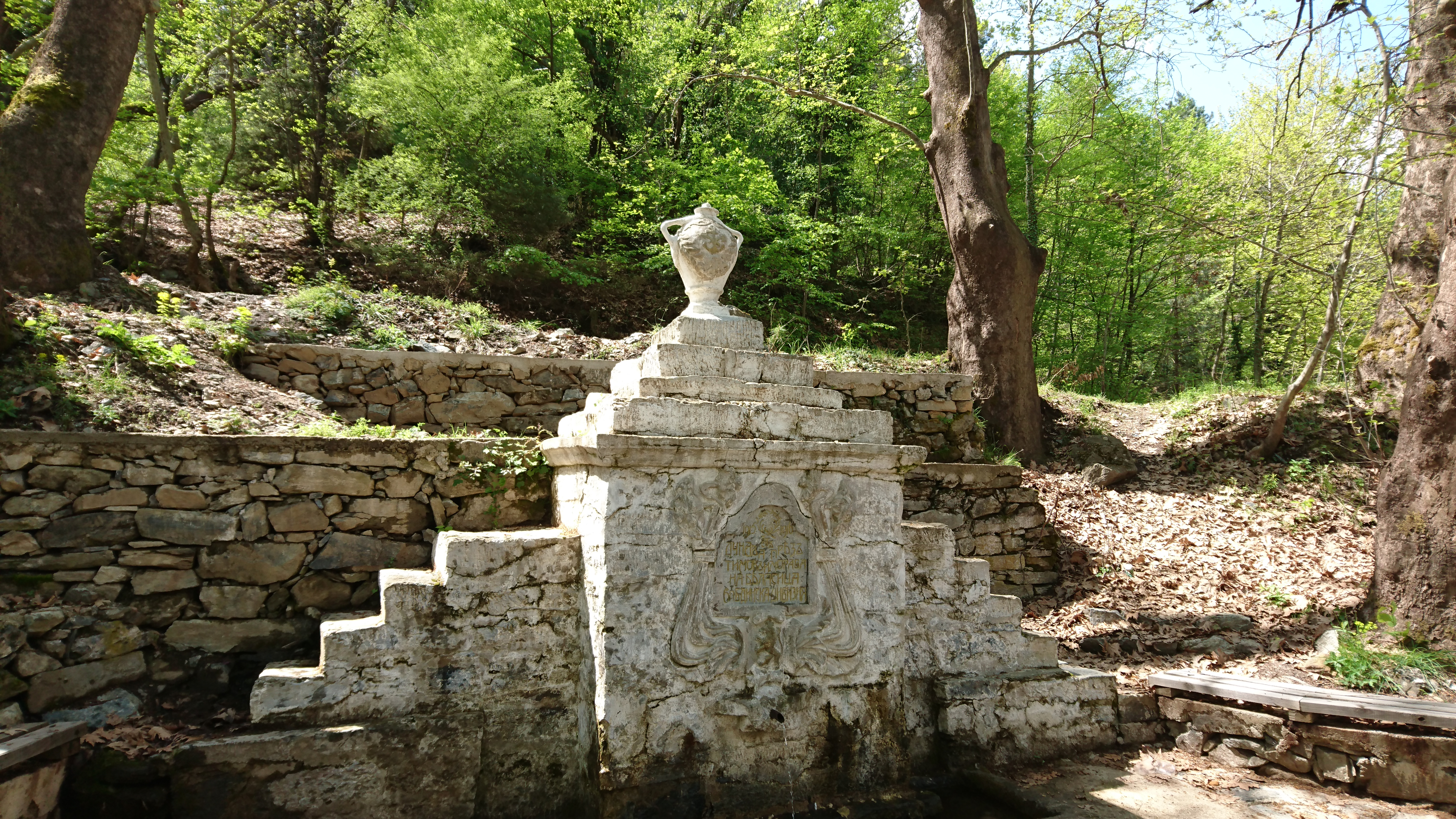 Войнишки паметник-чешма "Белата чешма", Самуилово, Югозападна България